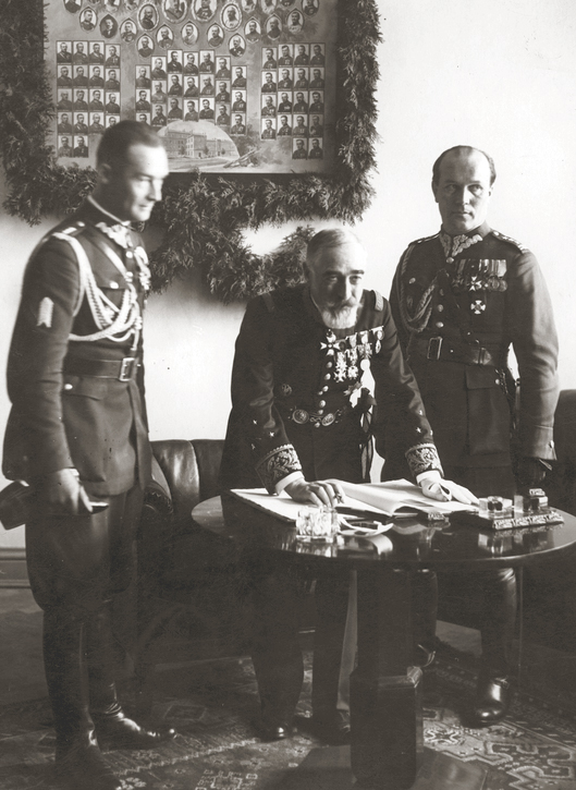 Dowódca 8 pp Leg. Leopold Engel-Ragis